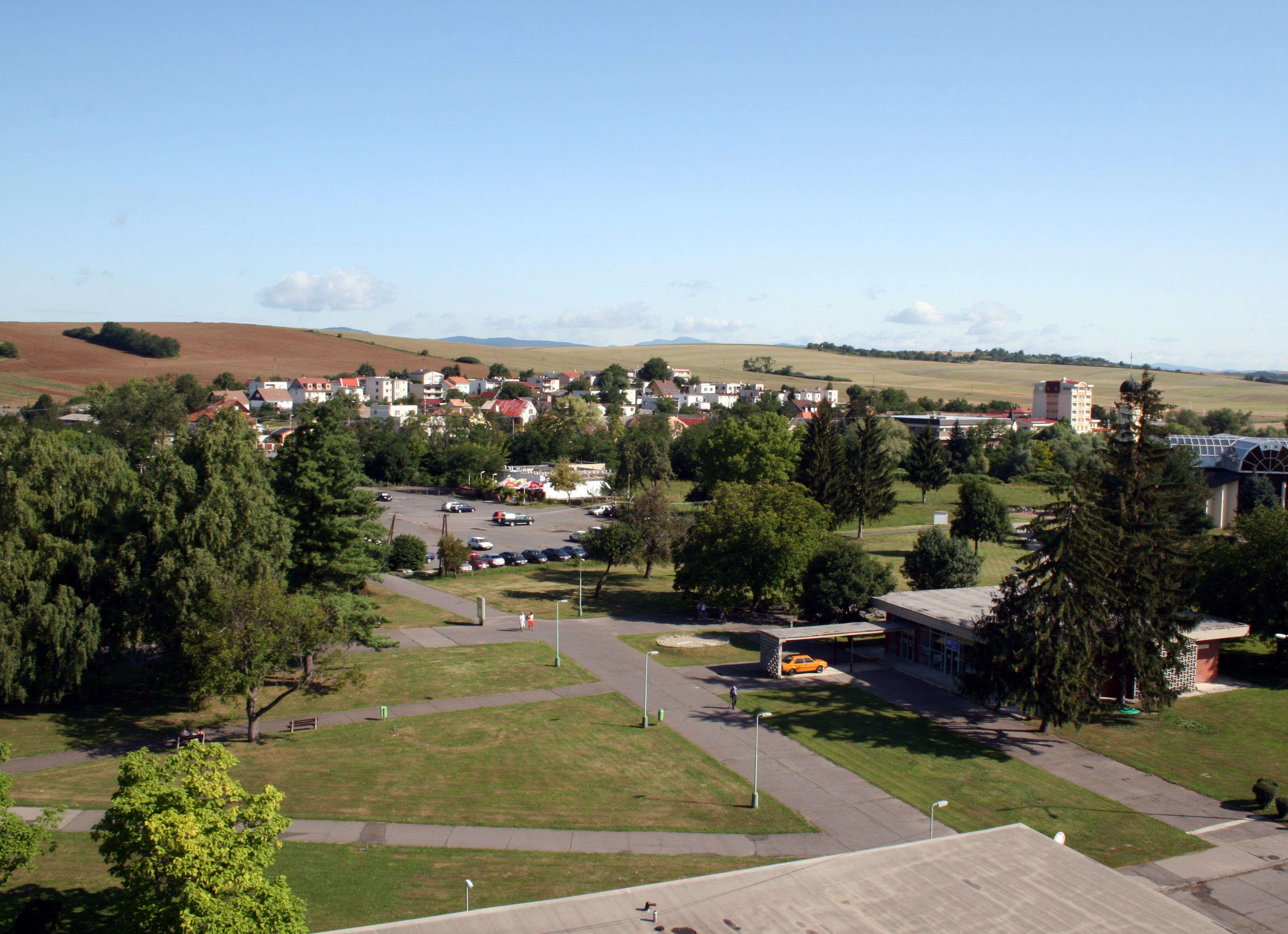 Pôvodná osada Dudince